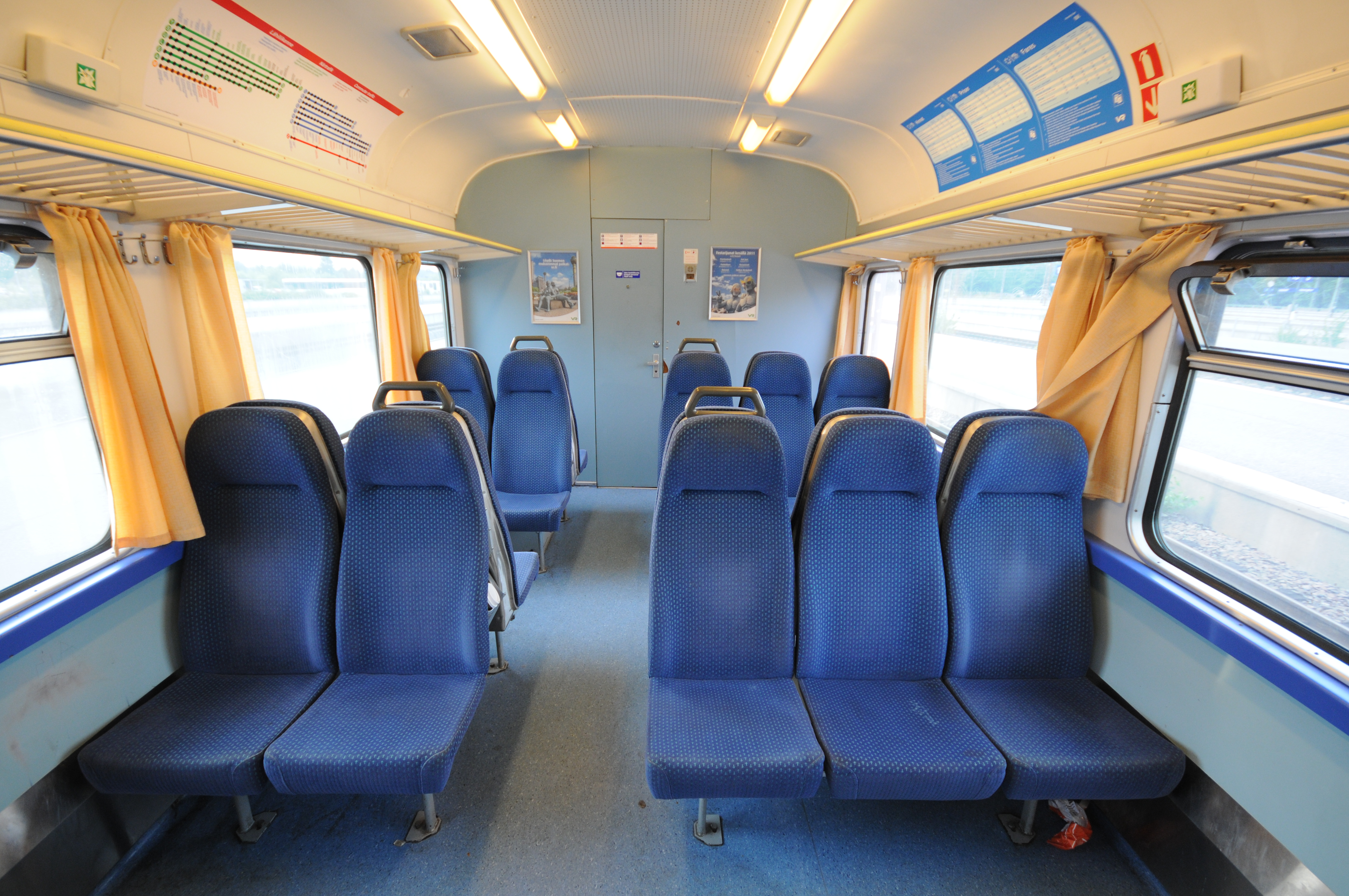 Helsinki Hauptbahnhof